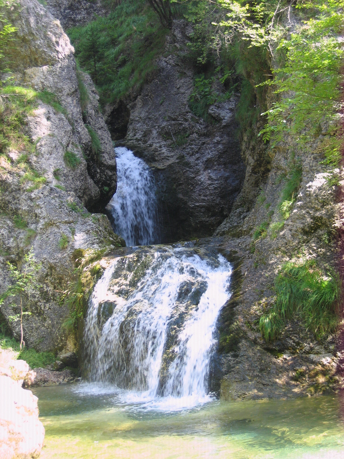 Kramaršca, 2009